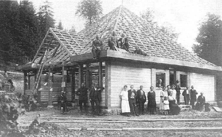 Richtfest des Eingangshauses 1925